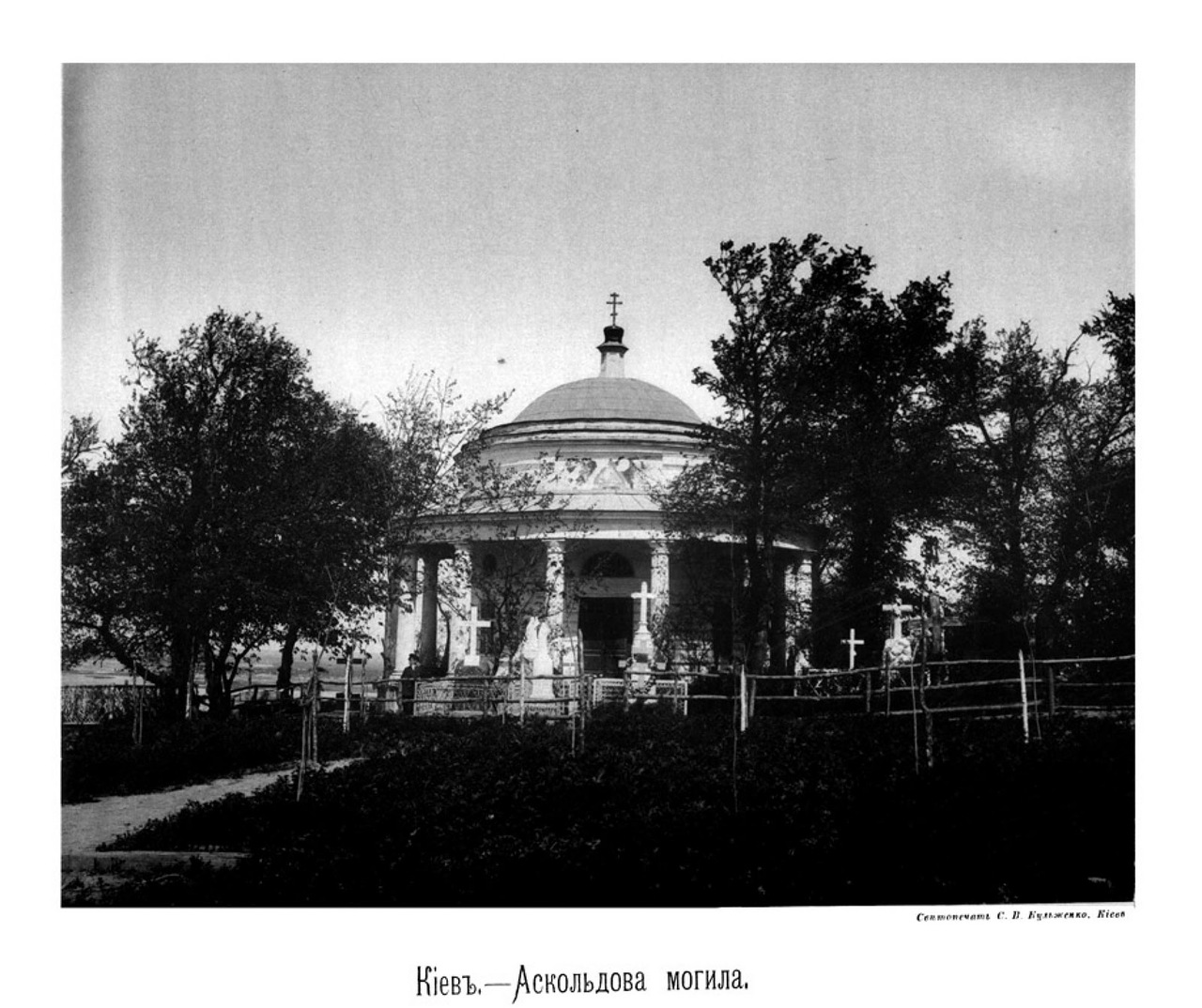 Аскольдова могила Київ (Grave of Askold, Kyiv),1888